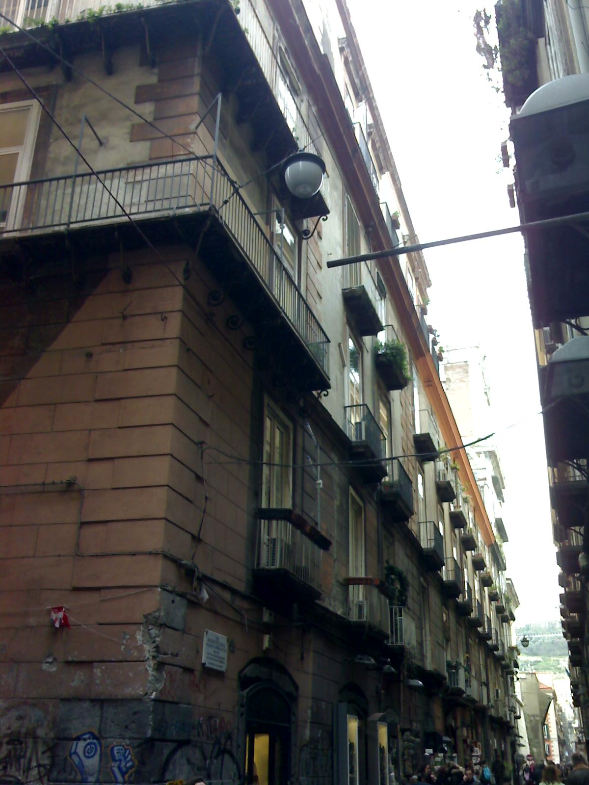 Palazzo Mazziotti (Napoli) - Facciata su Spaccanapoli